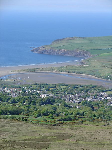 Панорамен изглед от Нюпорт